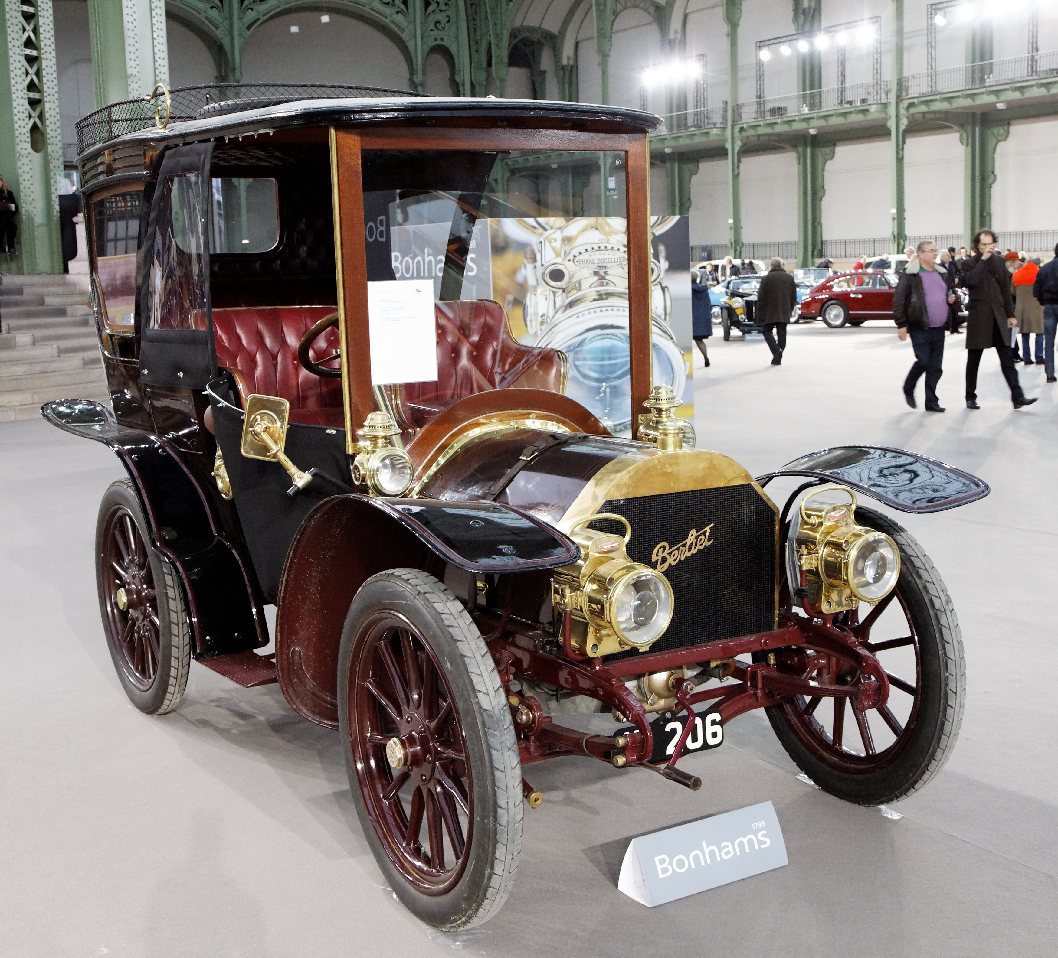 Berliet 20 CV Demi-limousine